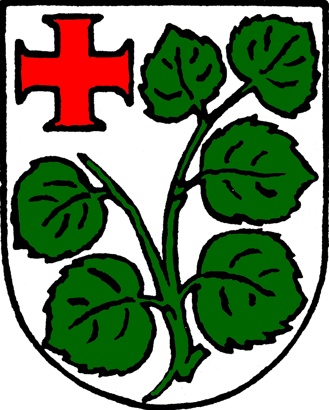 Wappen von Schenklengsfeld